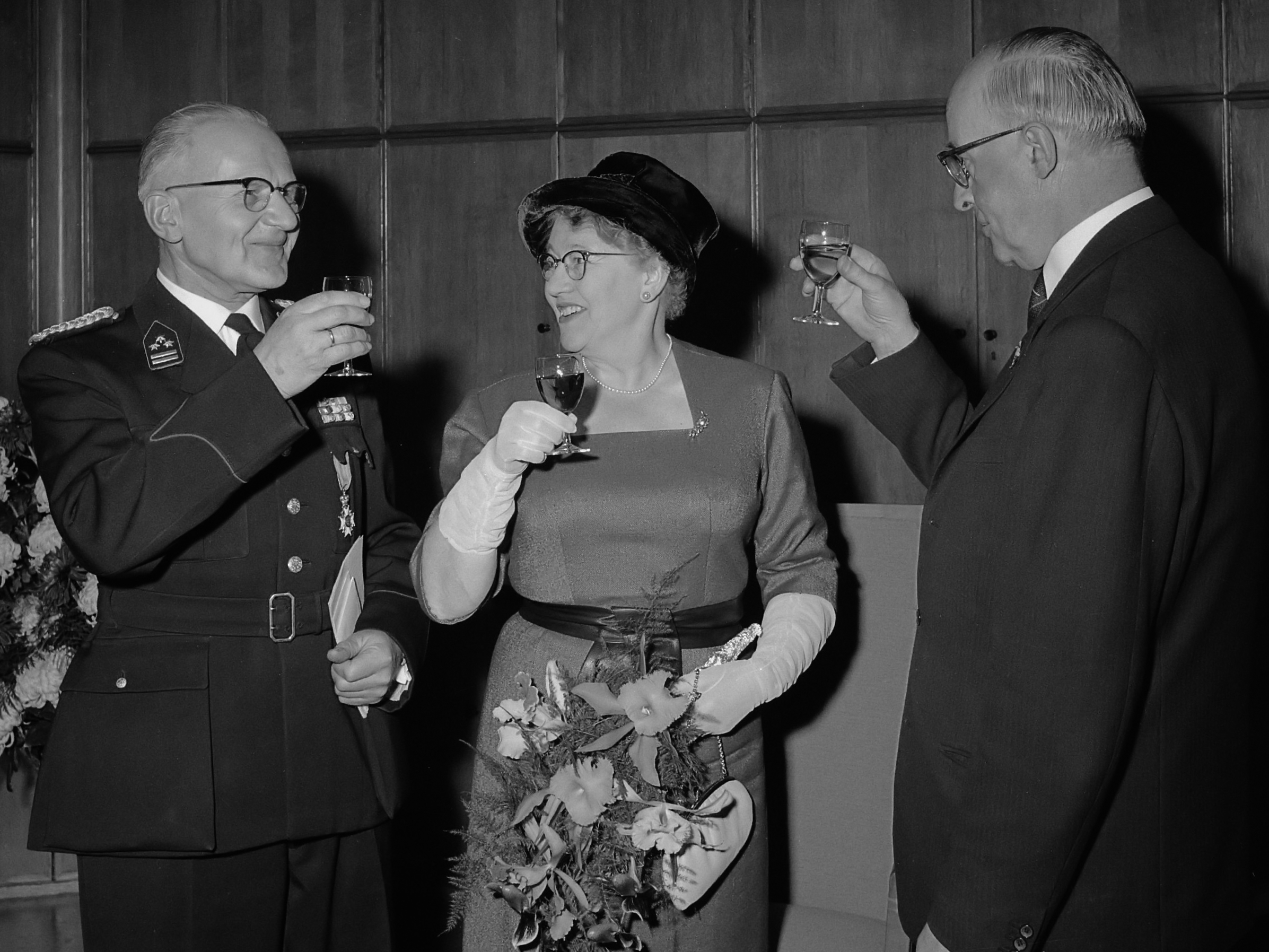 Afscheidsreceptie van hoofdcommissaris van politie H. M. C. A. Staal te Rotterdam, v.l.n.r. commissaris Sta mevrouw Staal en burgemeester Van Walsum heffen het glas 30 november 1960